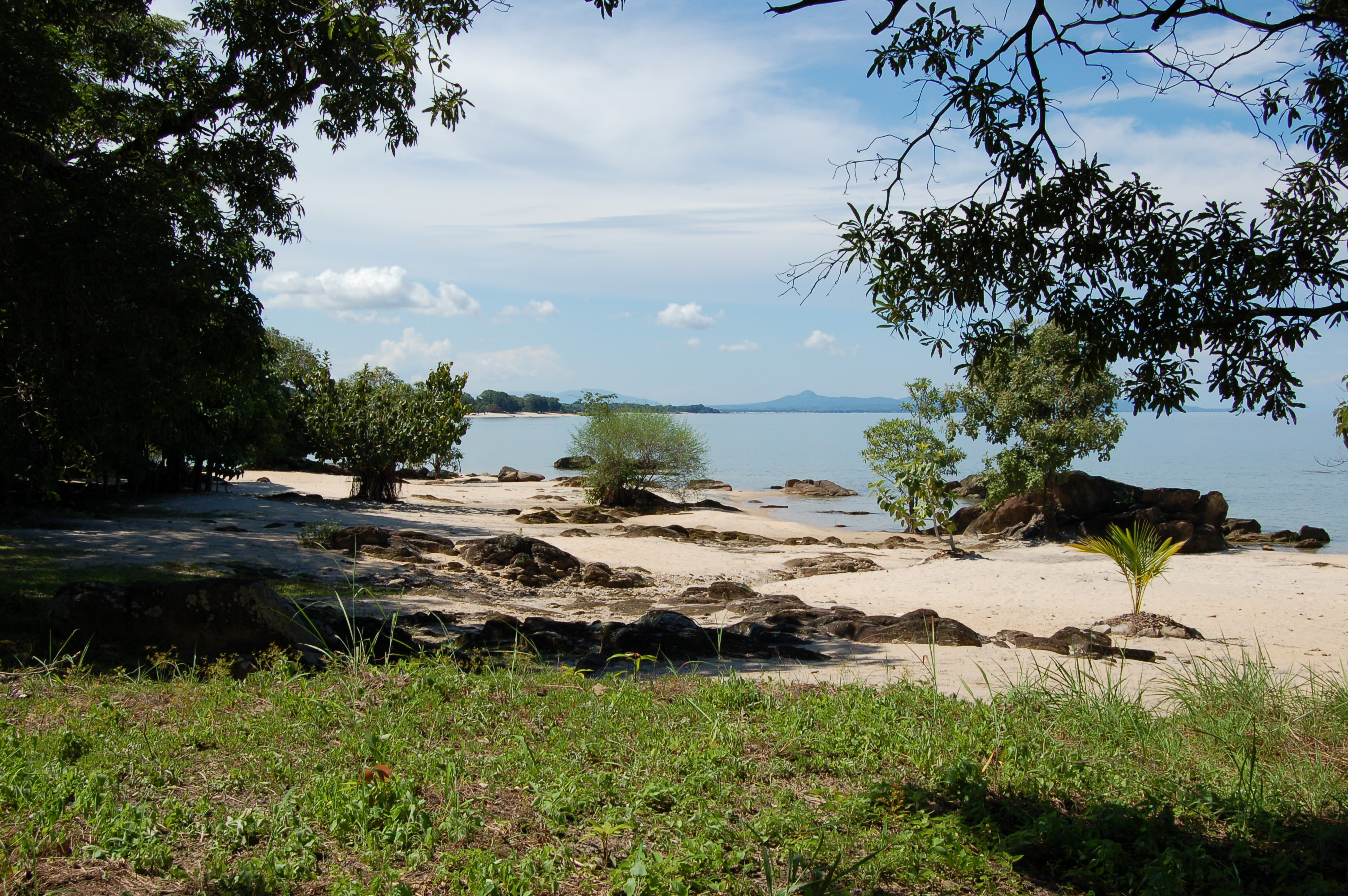 Lake Malawi, Malawi